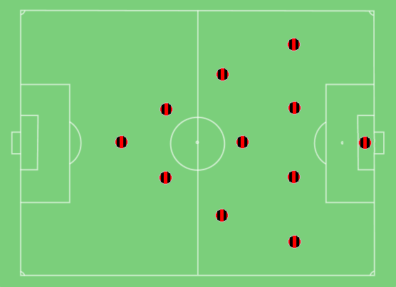 Taktyka i ustawienie Milanu w finale Ligi Mistrzów 2007 AC Milan tactics - UEFA Champions' League 2007 final Dida — Massimo Oddo, Alessandro Nesta, Paolo Maldini, Marek Jankulovski (Kacha Kaładze 80') — Gennaro Gattuso, Andrea Pirlo, Massimo Ambrosini, Clarence Seedorf (Giuseppe Favalli 90+2') — Kaká — Filippo Inzaghi (Alberto Gilardino 88') zobacz też / see also: AC Milan 23may07 lineup.png